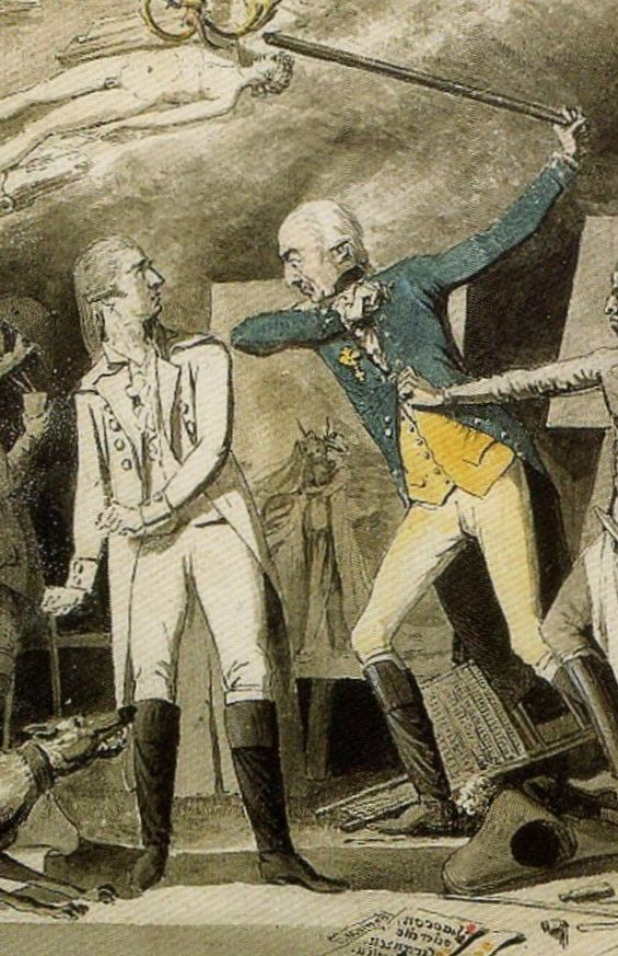 Karikatur auf die Kunstpraxis an der Hohen Karlsschule, Ausschnitt